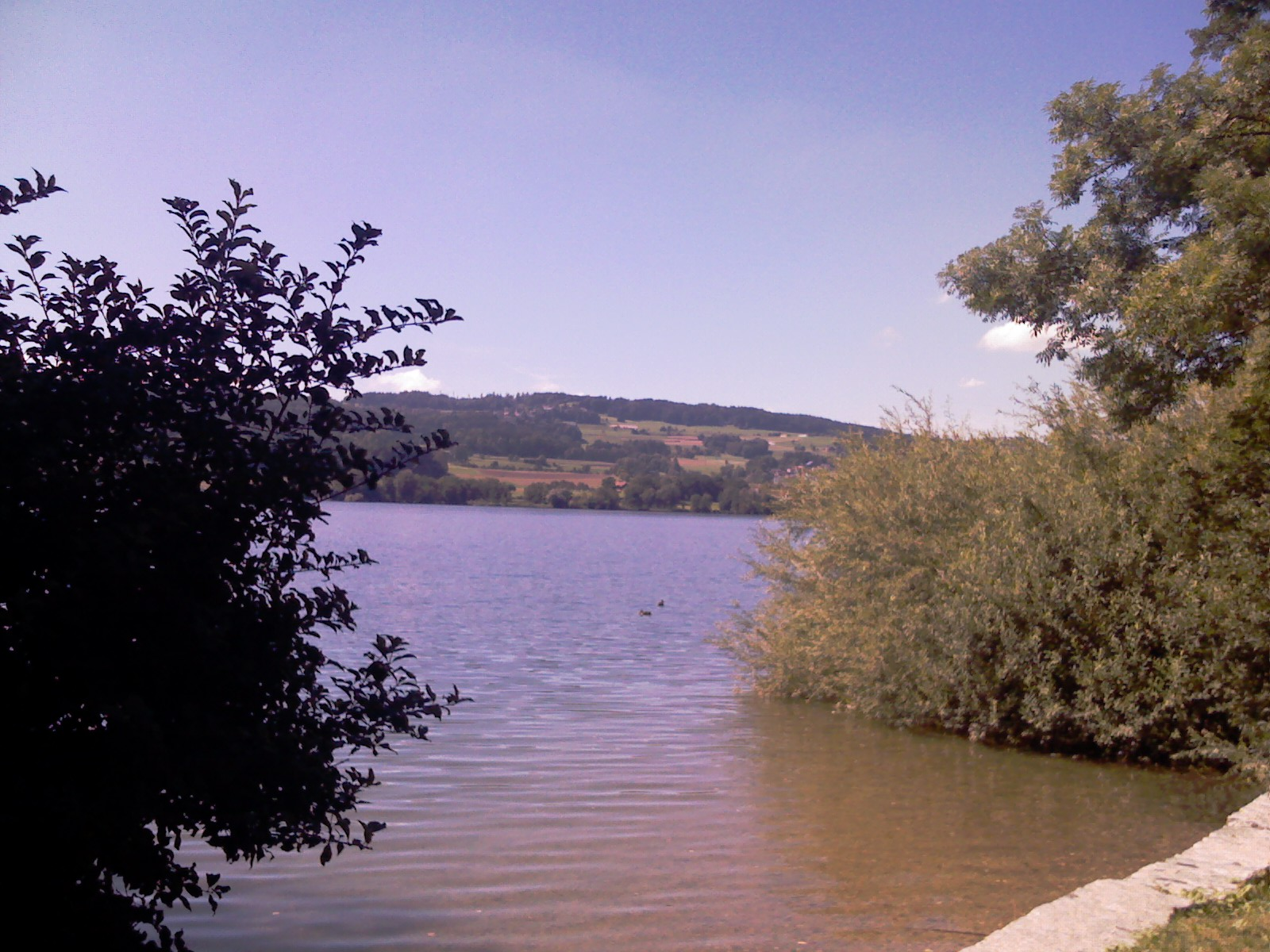 Greifensee view from the board of Niederuster to Zürichberg - Greifensee, vido de la bordo de Niederuster al Zürichberg